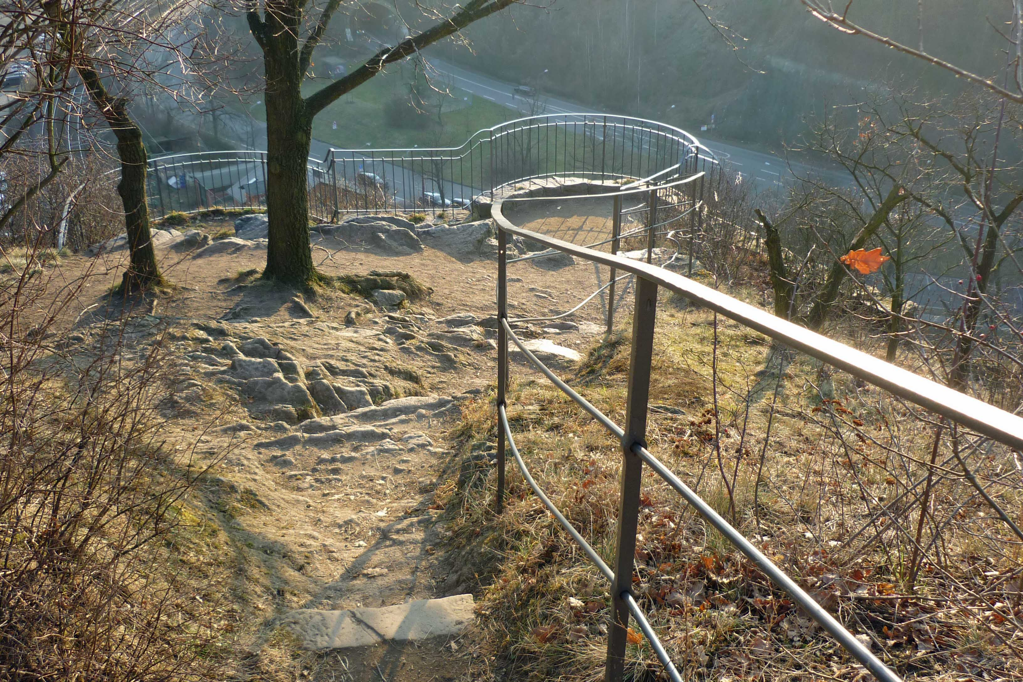 Aussichtsbastion im Bienertpark Dresden-Plauen